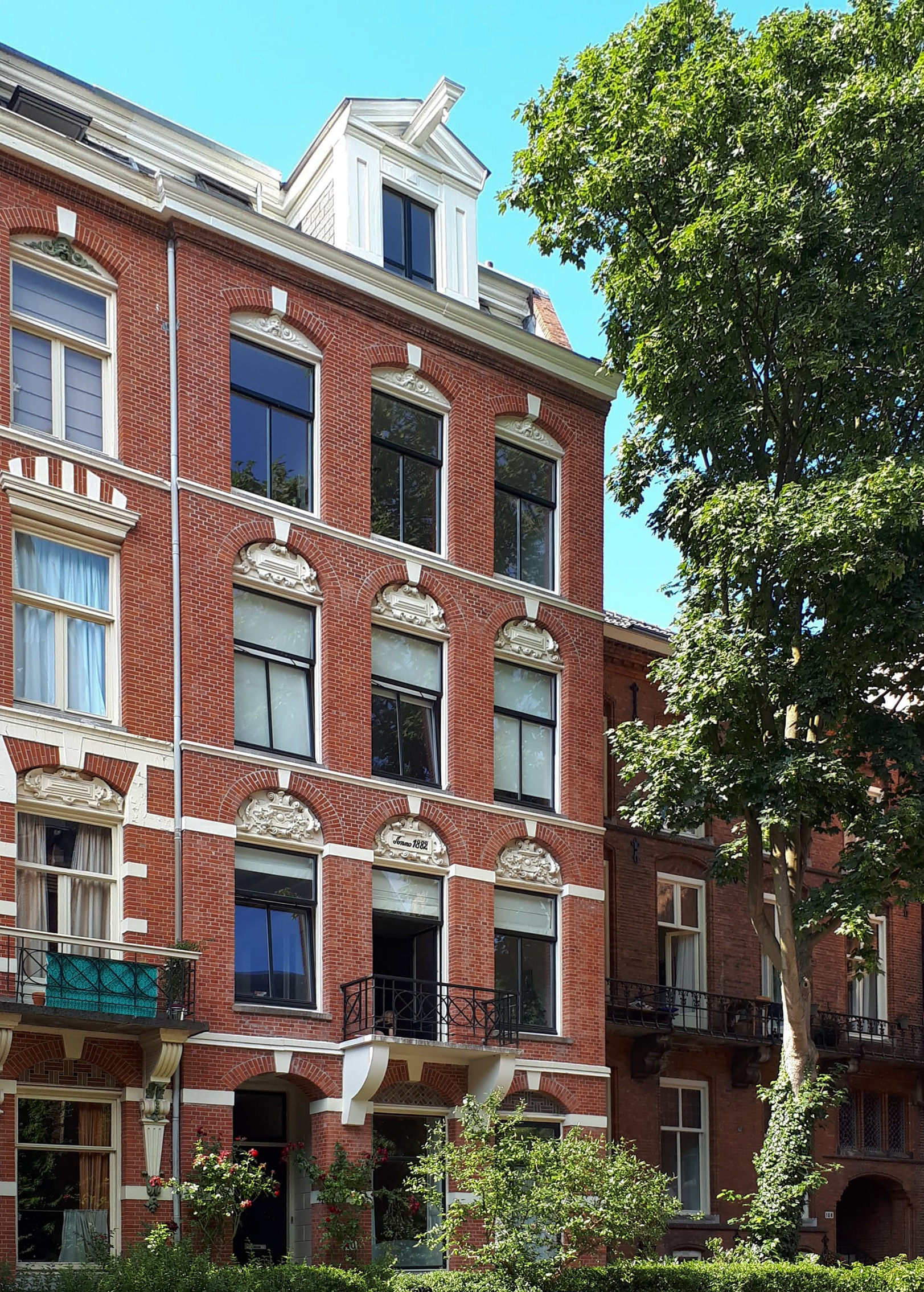 Haus Vondelstraat 110 in Amsterdam - Untertauchadresse der Fotografin Maria Austria